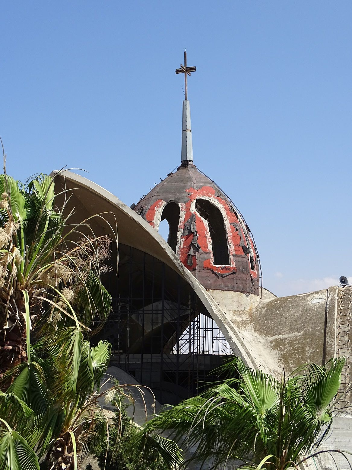 A homszi katedrális kívülről, szentélye